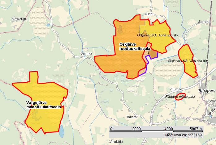 Orkjärve LKA ja Valgejärve MKA paiknemine kaardil. Põhineb Maa-ameti kaardil.